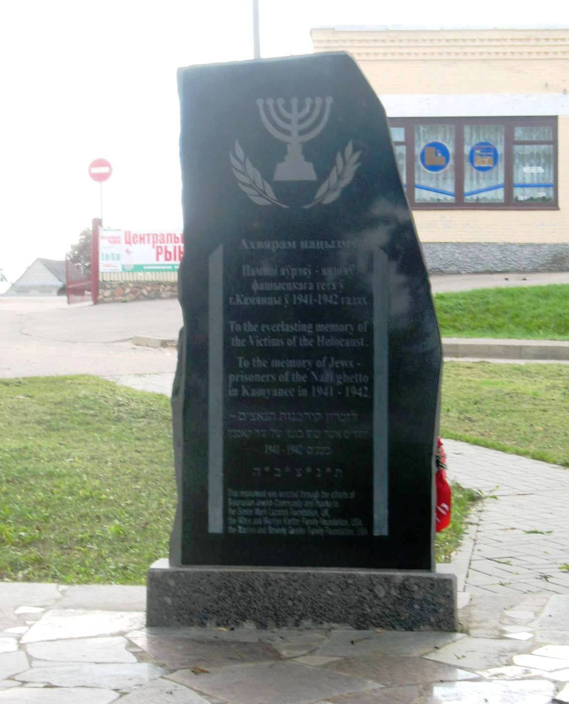 Памятник евреям - узникам гетто города Каменец (Каменец-Литовский), убитым нацистами и их пособниками в 1942 году. Установлен в 2009 году на пересечении улиц Пролетарской и Чкалова, где в годы войны находилось гетто.